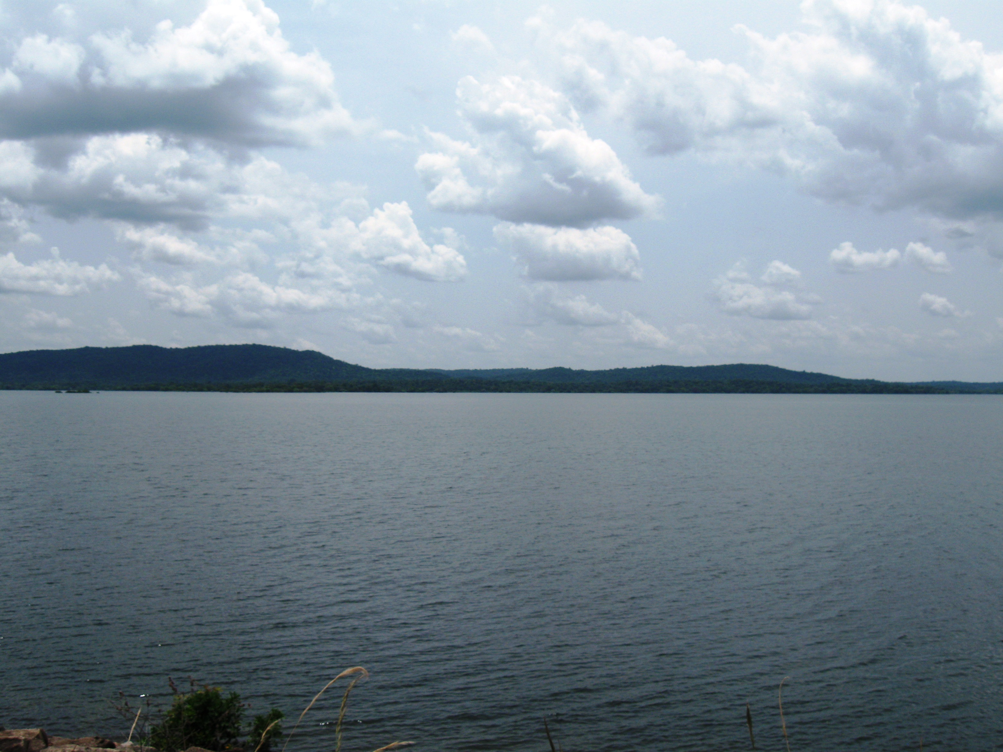 Photograph of Kantalai Tank, Sri Lanka